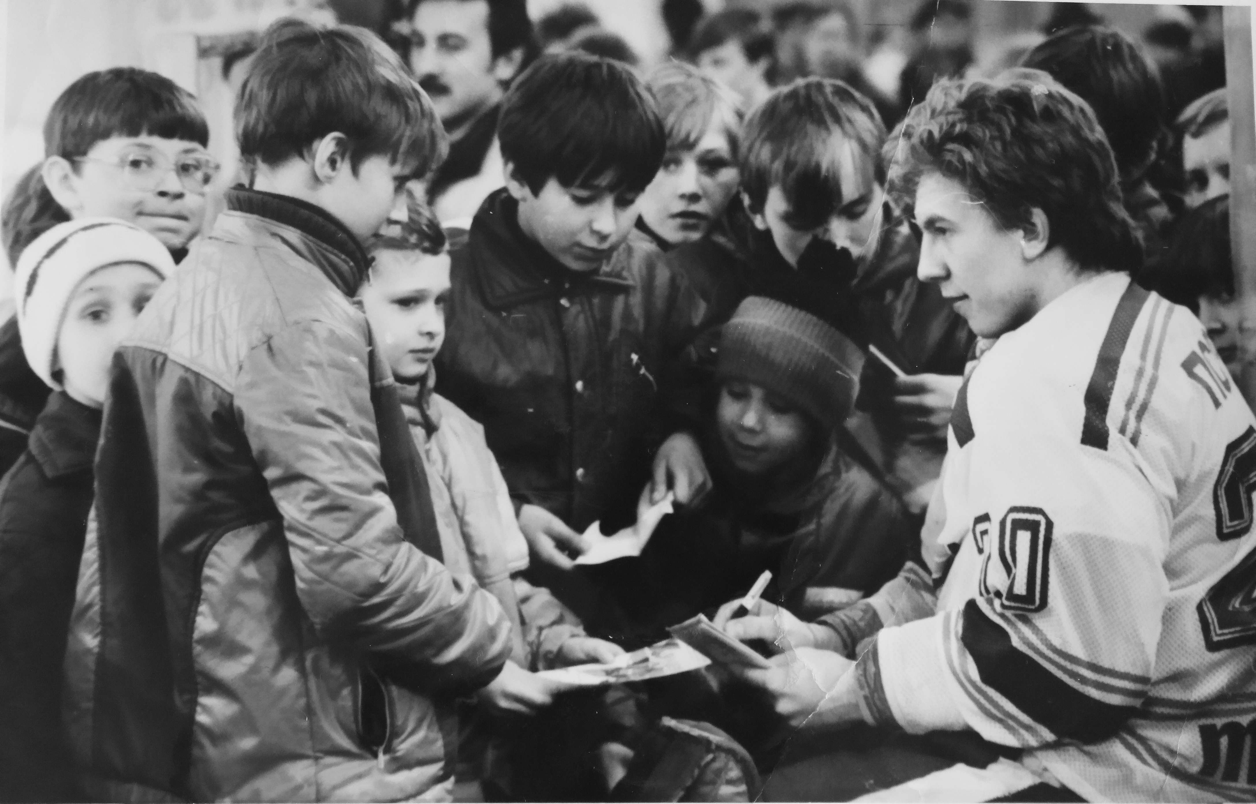 A.Псарёв - апрель, 1988г., Ярославль